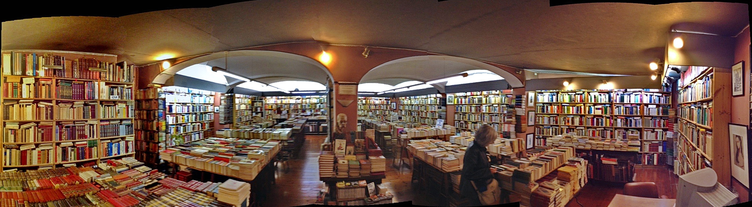 Panoràmica de la desapareguda Llibreria Canuda, que sota la denominació de "Cementiri dels llibres", apareix a la novel·la "L'Ombra del Vent" de Carlos Ruiz Zafon